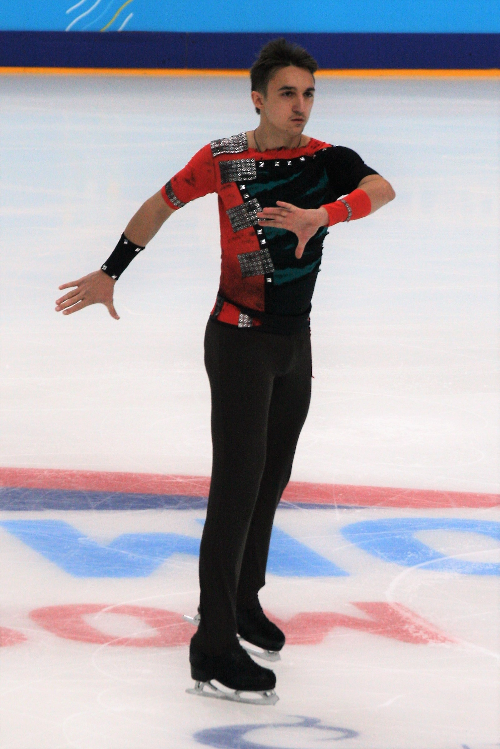 Артур Дмитриев (мл.) на Rostelecom Cup 2016